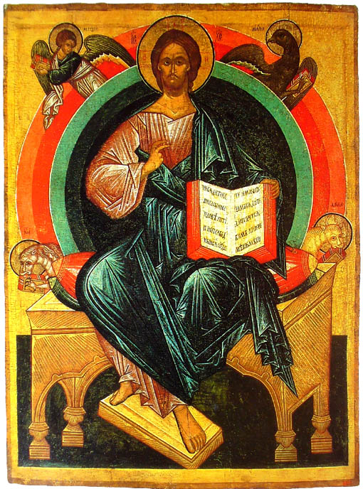 Pantocrator. Вседержитель